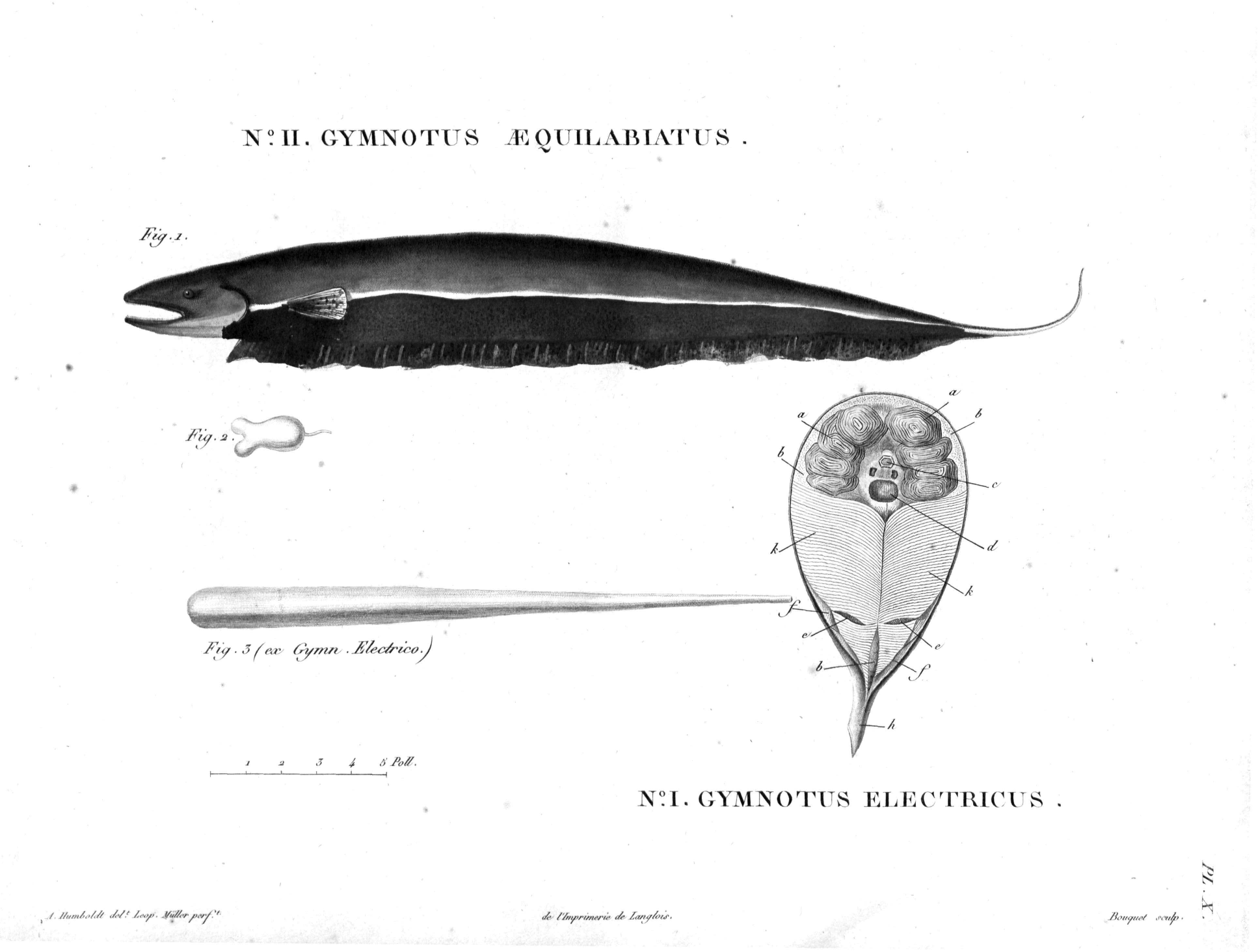 Sternopygus aequilabiatus aequailabiatus (Humboldt, 1805), elektrisches Organ von Electrophorus electricus (Linnaeus, 1766)